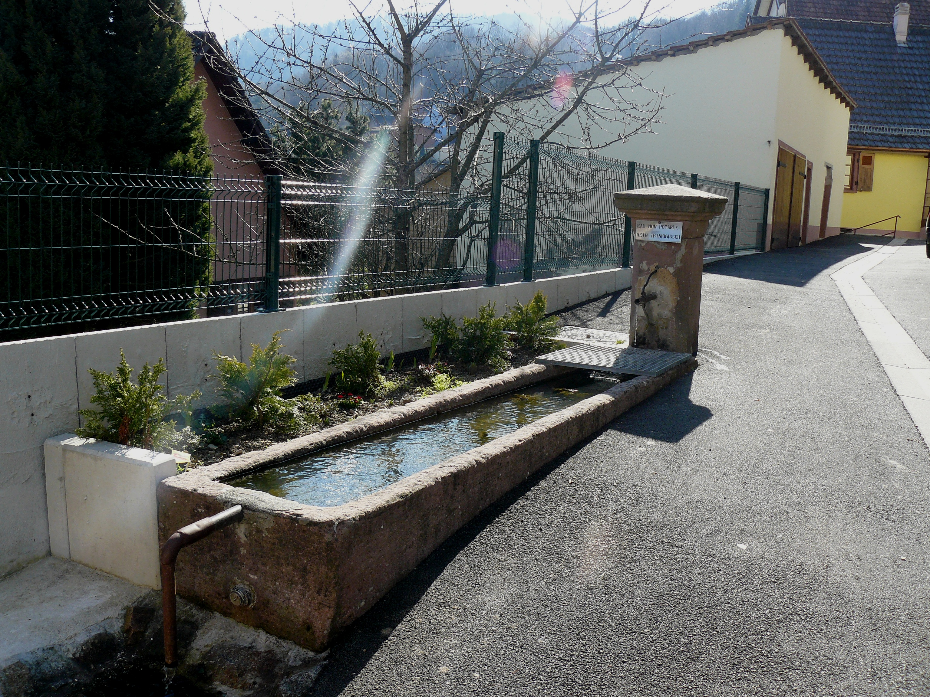 Fontaine Saint Pierre rue des Jardins